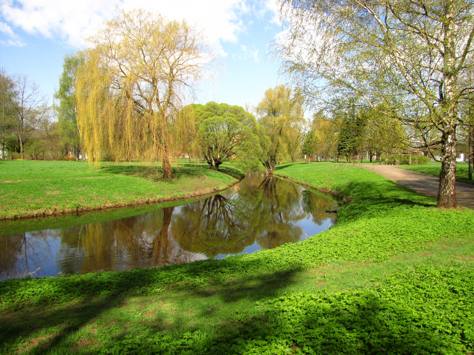 pavasaris uzvaras parka